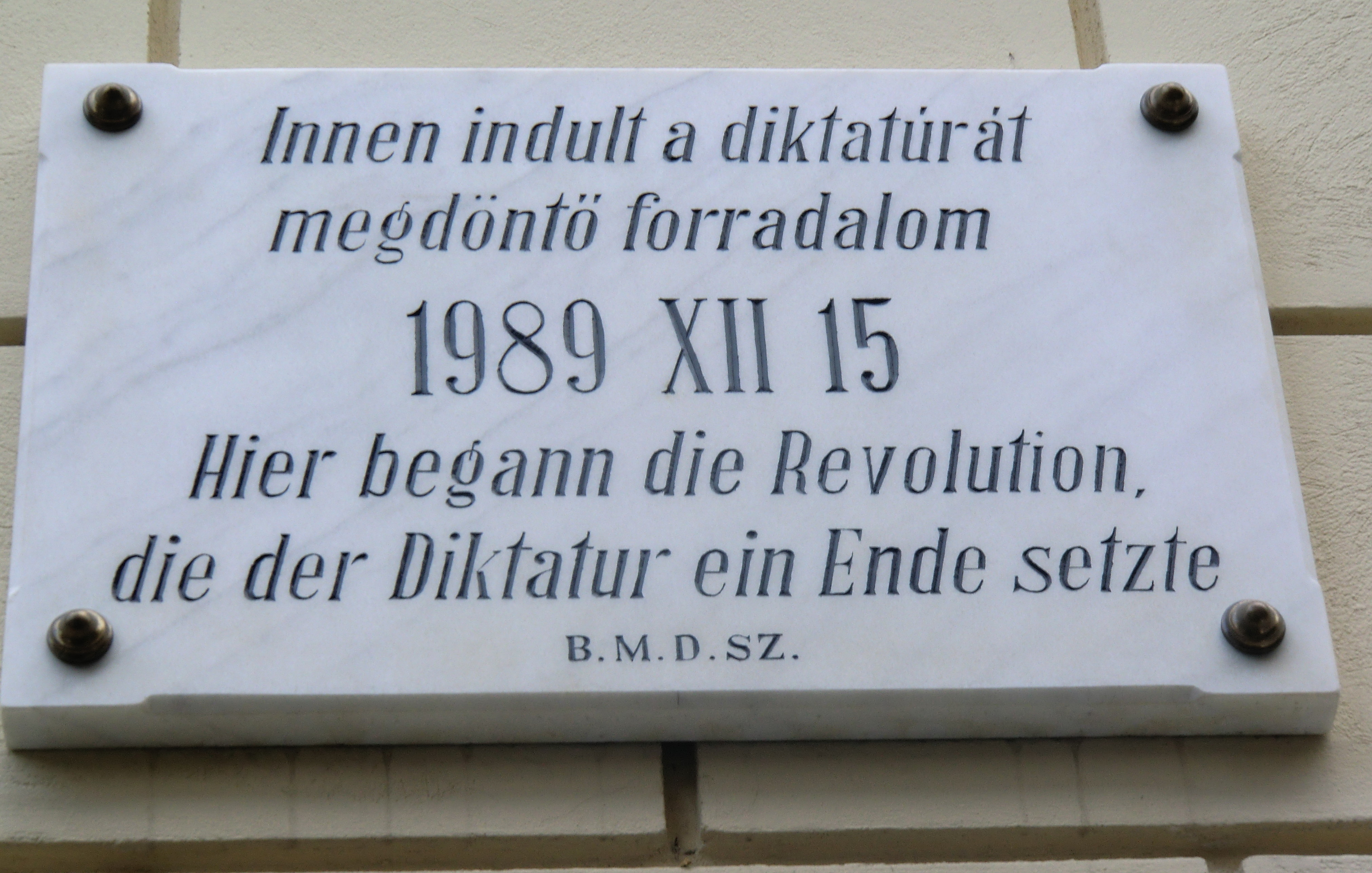 Erinnerungstafel: Beginn der Revolution von 1989 in Timișoara.